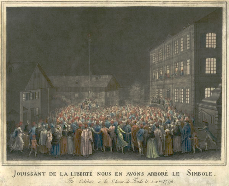 Jouissant de la liberté nous en avons arboré le simbole. Fête célébrée à la Chaux de Fonds, 1792. Tiré de SHAN, conservé au musée d’art et d’histoire de Neuchâtel